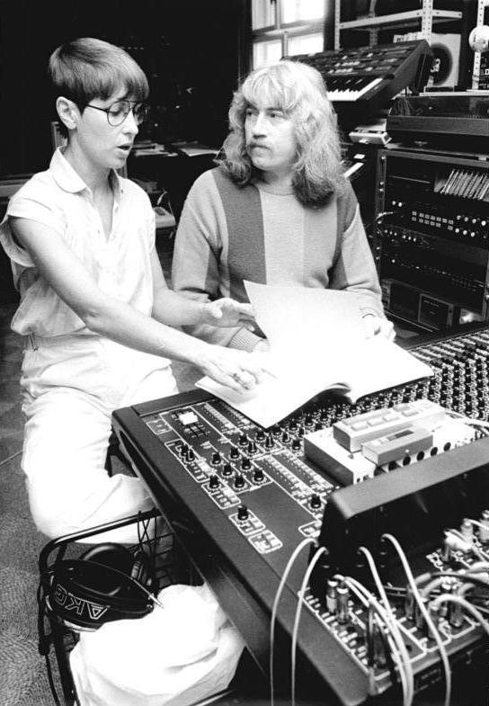 Berlin, Reinhard Lakomy, Monika Ehrhardt ADN-ZB Senft 7.1.87 Berlin: Vorwiegend für Kinder arbeitet die Schriftstellerin Monika Ehrhardt (l.) Musikalisches kommt von ihrem Mann, dem Komponisten und Musiker Reinhard Lakomy (r.) dazu, mit dem sie seit 1977 verheiratet ist. Neben bisher vier gemeinsamen Langspielplatten für Kinder gehören Theaterstücke wie "Ferdinand rettet die Sonne" (1979) und Bücher wie "Die Mittagsfee" (1982) zu ihren Erfolgen. Gegenwärtig erfreut die Revue "Die Sonne" als letzter Teil der Trilogie "Die Erde soll ein Garten sein" ("Wasserkristall", "Der Regenbogen") die Besucher im Kindertheater des Friedrichstadtpalastes. -siehe dazu die Fotos 1987-0107-15 u. 17N- Abgebildete Personen: Lakomy, Reinhard: Sänger, Komponist, DDR (GND 121996468) Ehrhardt, Monika: Schriftstellerin, DDR